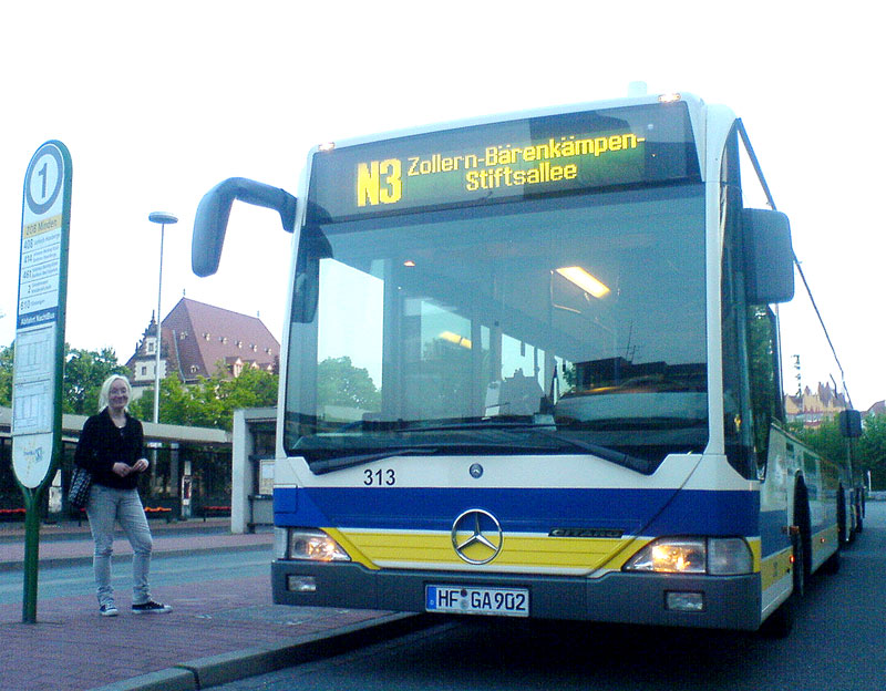 Nachtbus Linie 3 in Minden, Bus der ehemaligen VMR - kurz vor der Jungfernfahrt mit dem ersten Fahrgast.